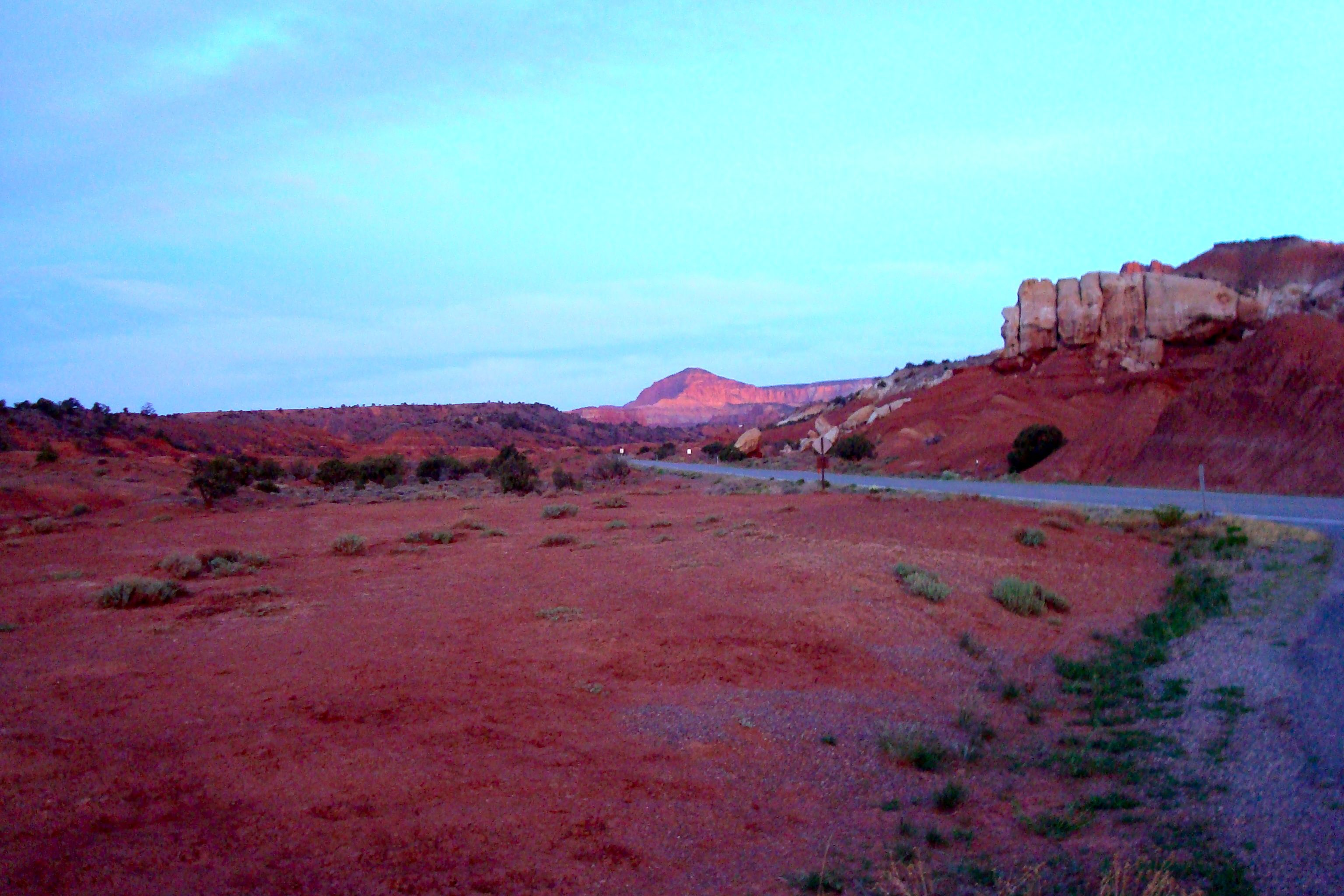 Early morning at SR24 at Capitol Reef National Park